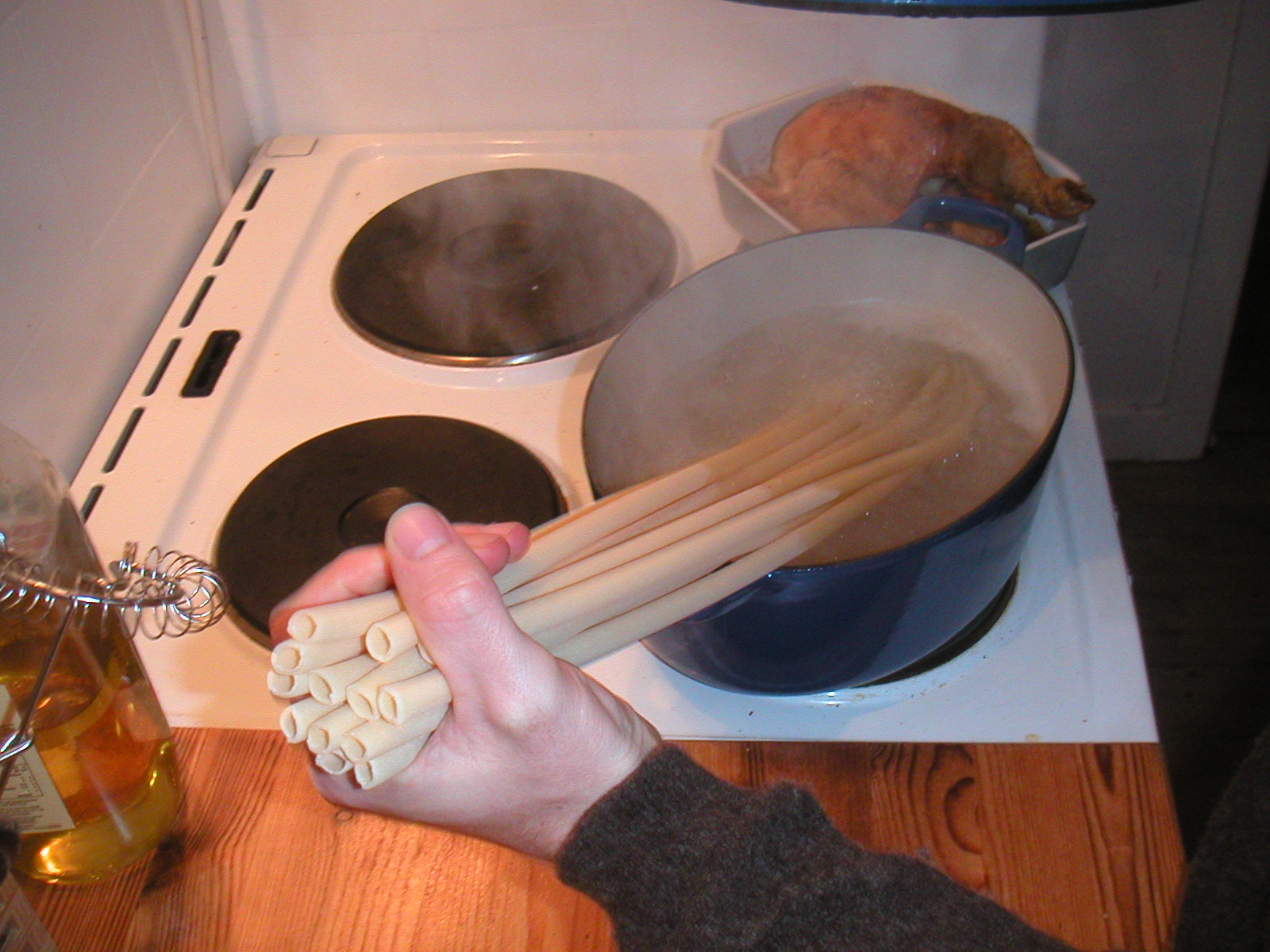 Kylling og pasta